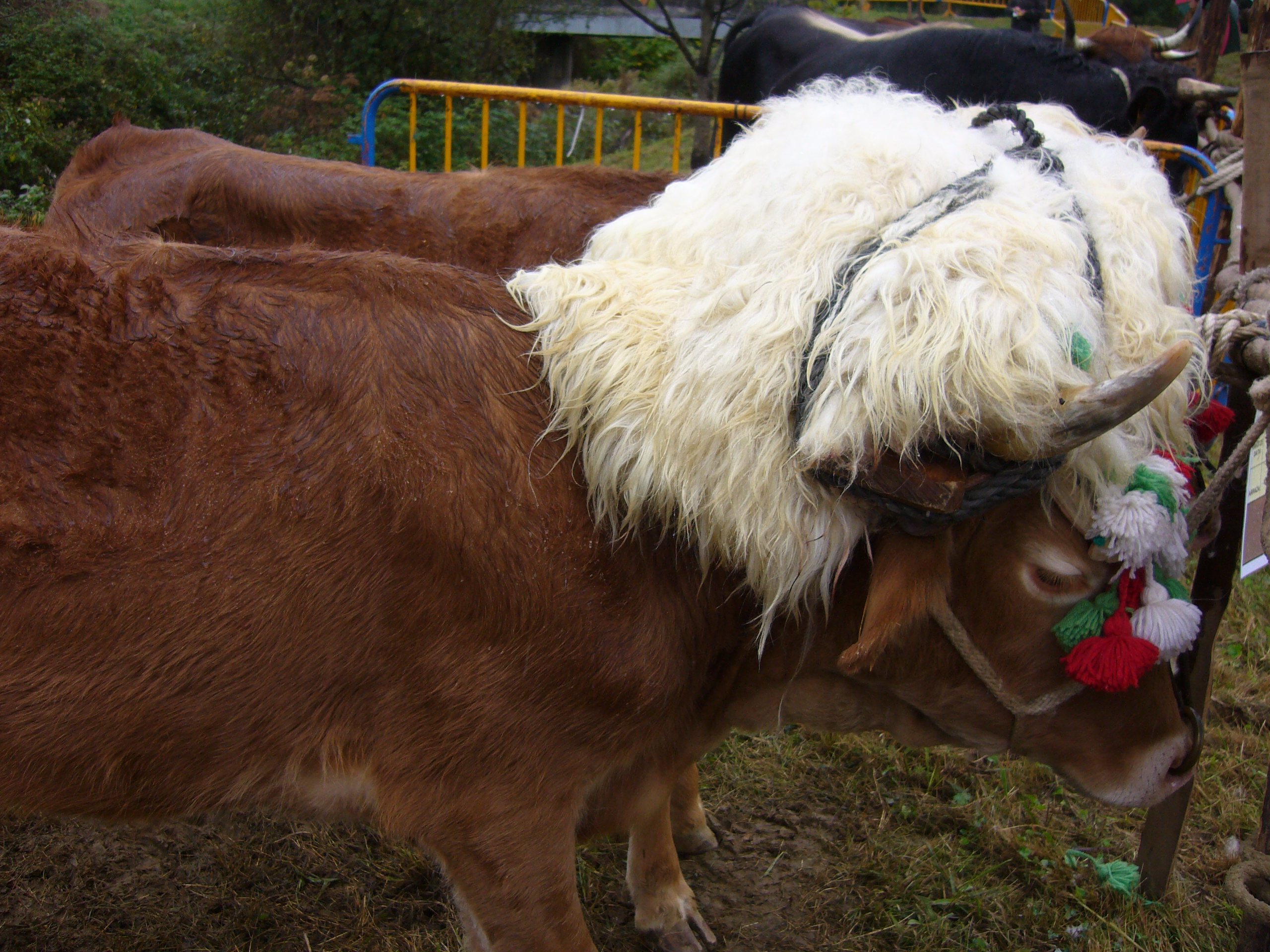 Bi betizu uztarrian